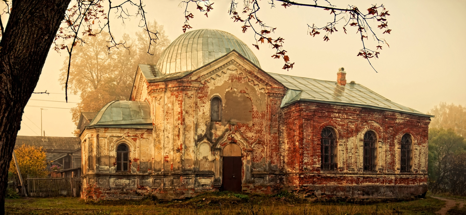 Церковь Архангела Михаила в селе Анкудиново Петушинского района Владимирской области. Церковь до реставрации купола и поднятия креста